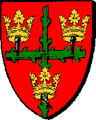 Colchester 140